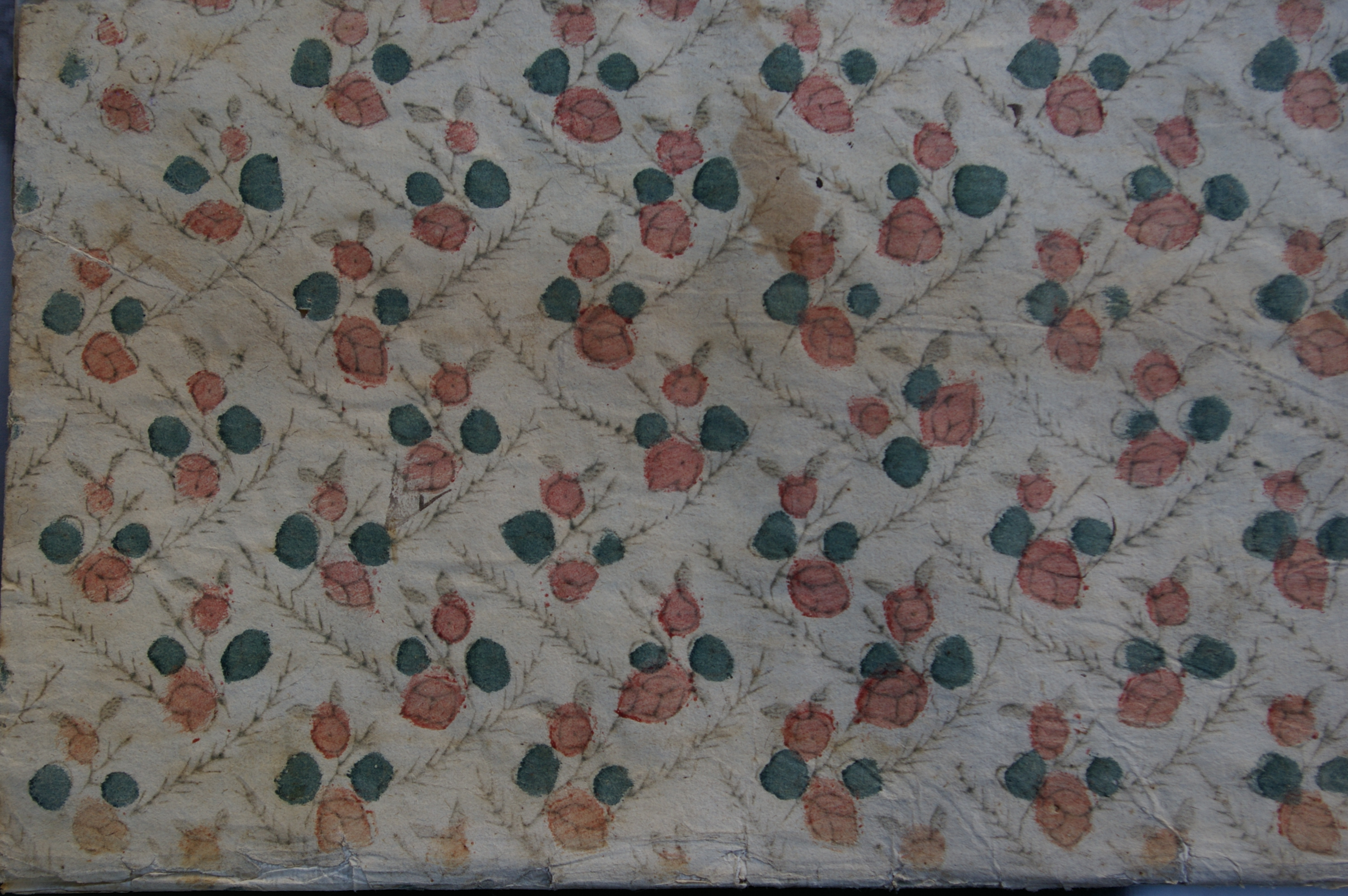 Papier dominoté provenant d'une couverture de livre, seconde moitié du XVIIIe siècle.